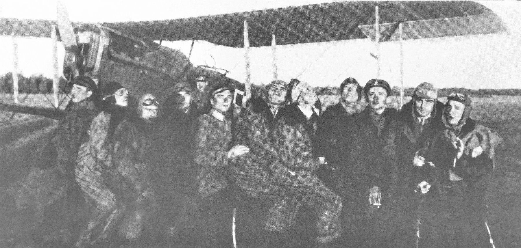 Personel 1 Eskadry Wywiadowczej w Październiku 1920 roku na lotnisku w Lidzie.